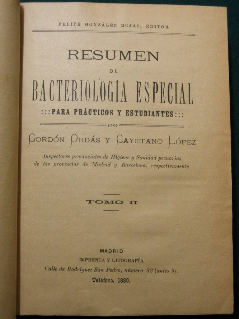 Fotografía de la primera página del libro: Resumen de bacteriología especial para prácticos y estudiantes por Gordón Ordás y Cayetano López. Foto tomada en Biblioteca de la Sociedad Bilbaina, Bilbao (España) el 14 de diciembre del 2011.